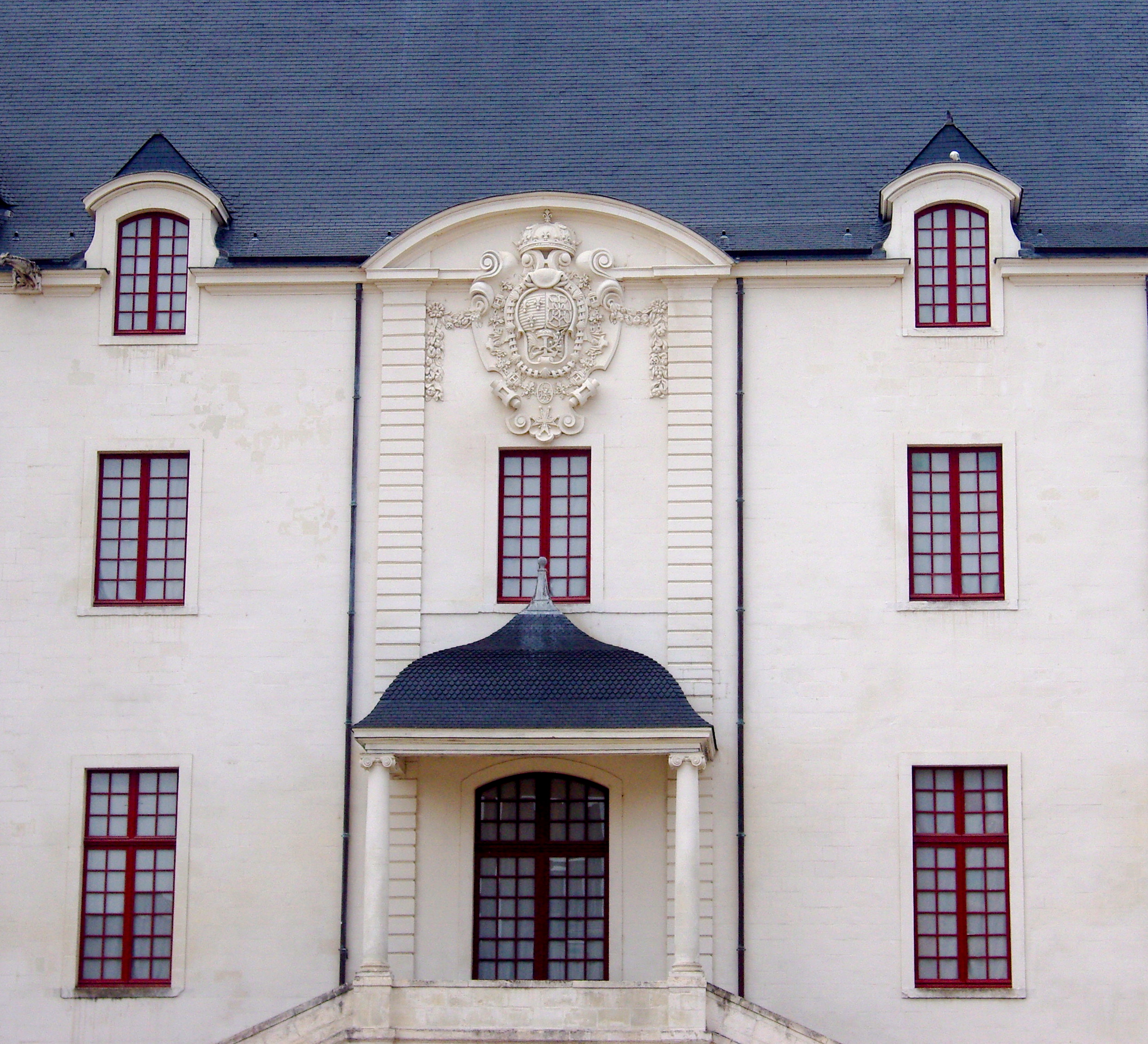 Château des ducs de Bretagne